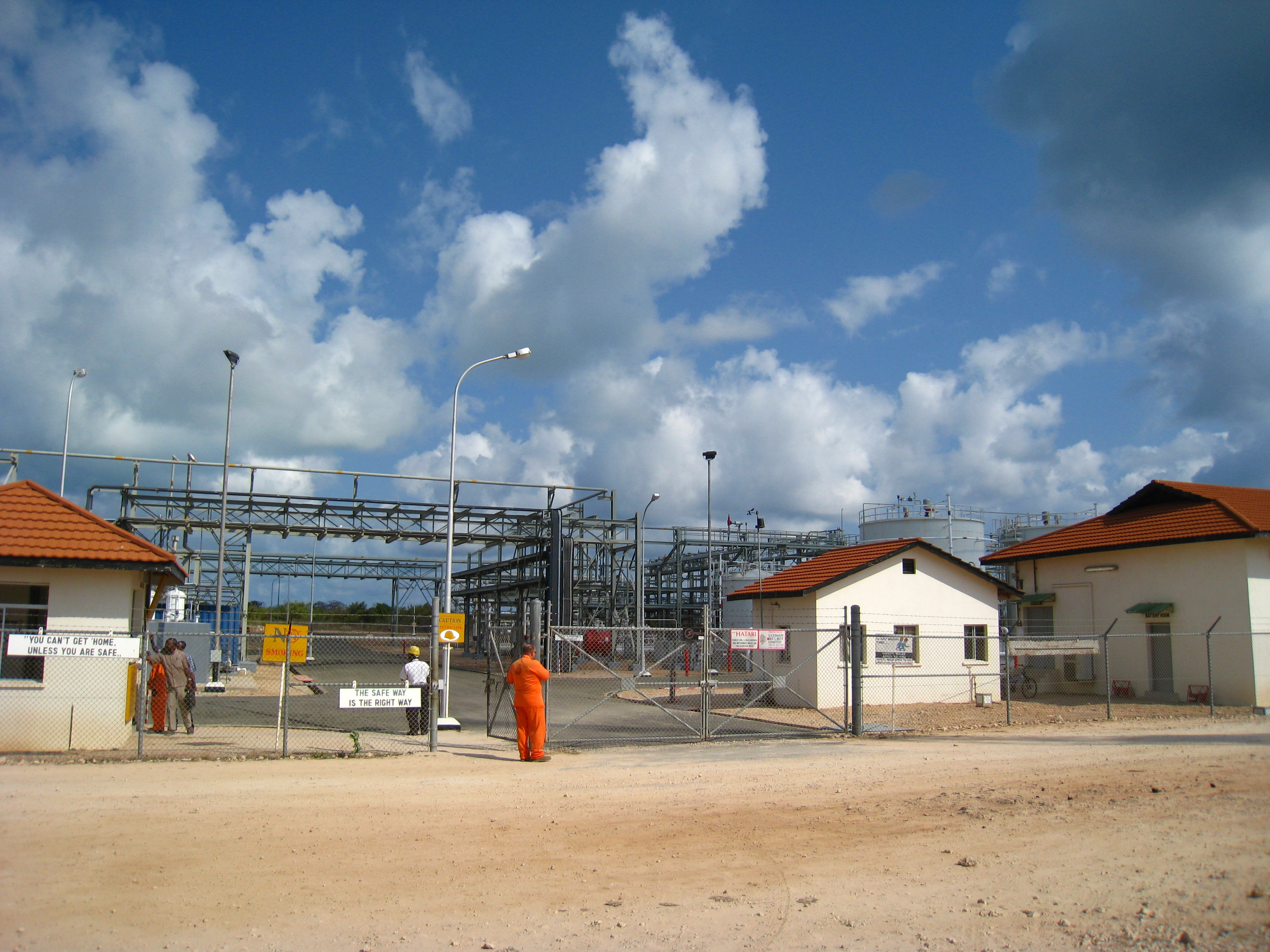 Songo Songo Gas Plant